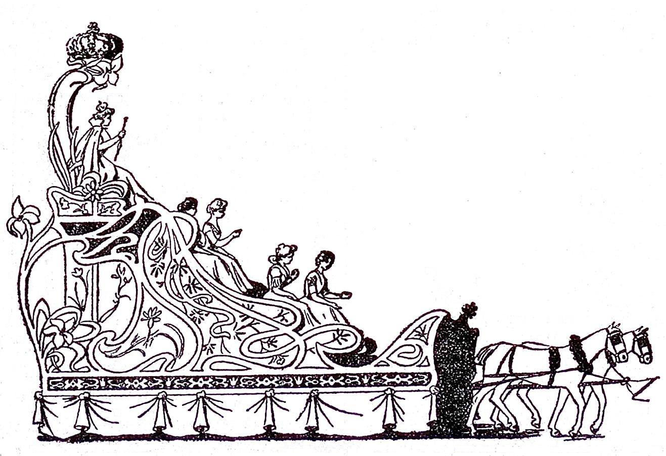 Dessin du char de la Reine des Reines de Paris de la rive droite 1902.